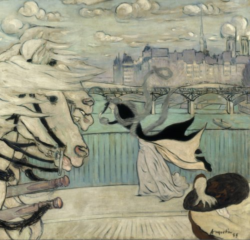 Huile sur toile - 120 x 127 cm Brême, Kunsthalle Photo : Kunsthalle Bremen